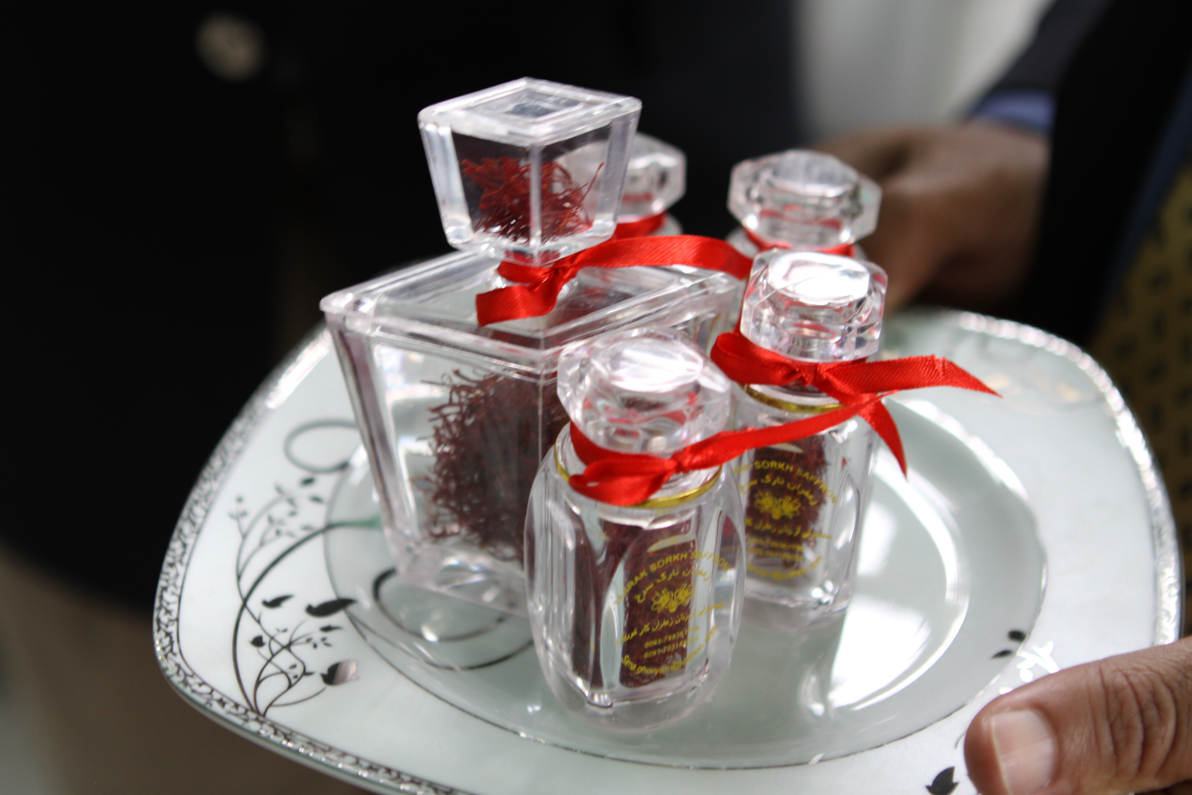 Afghan Saffron